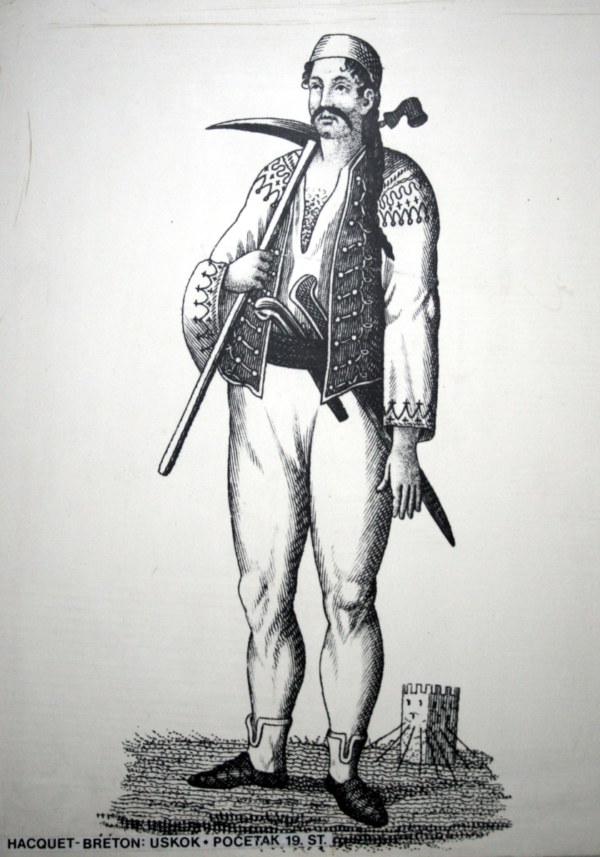 snimljeno tijekom Noći muzeja u Etnografskom muzeju u Zagrebu